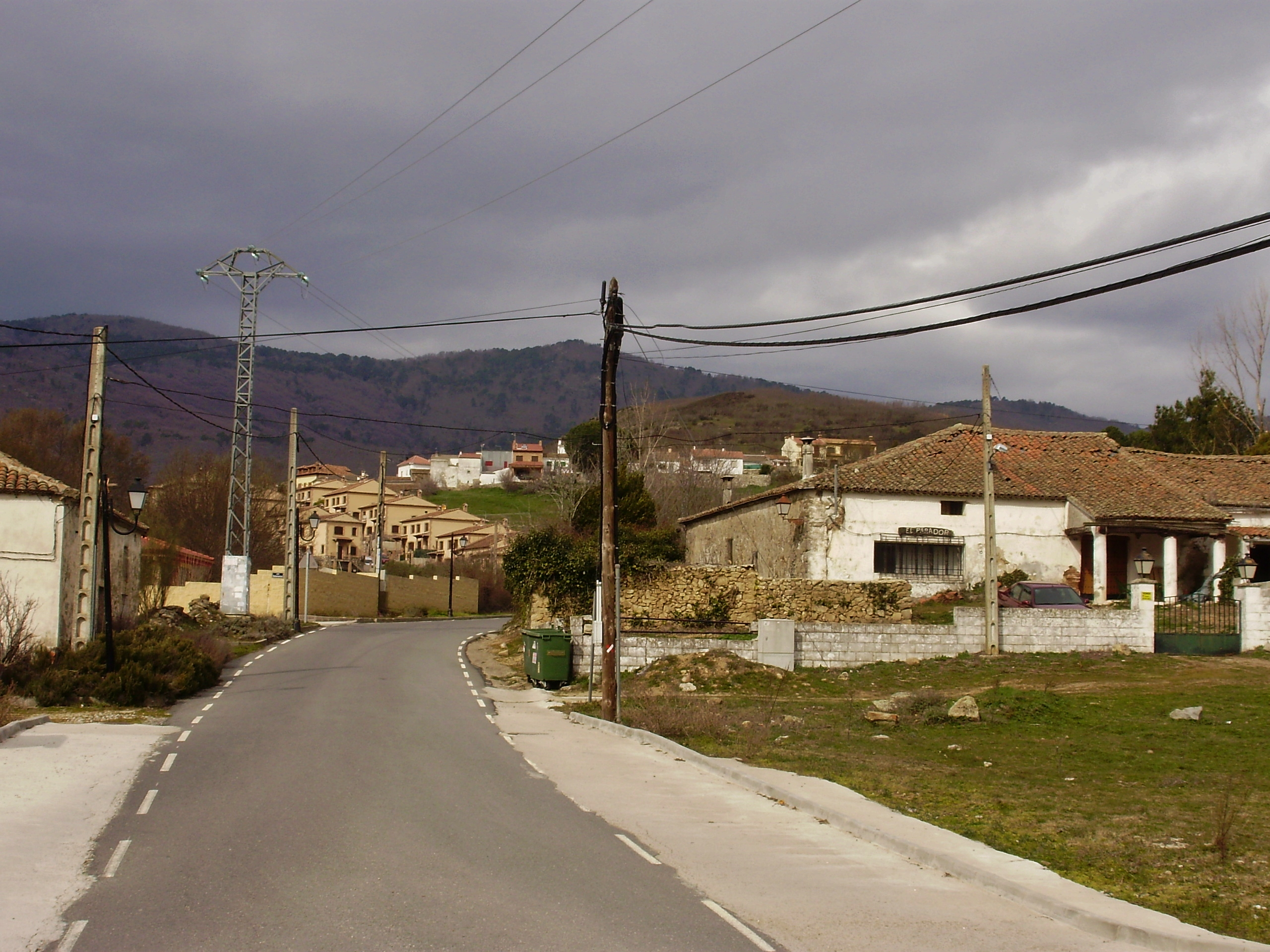 Vista general de la localidad de Navahondilla, Ávila, España.